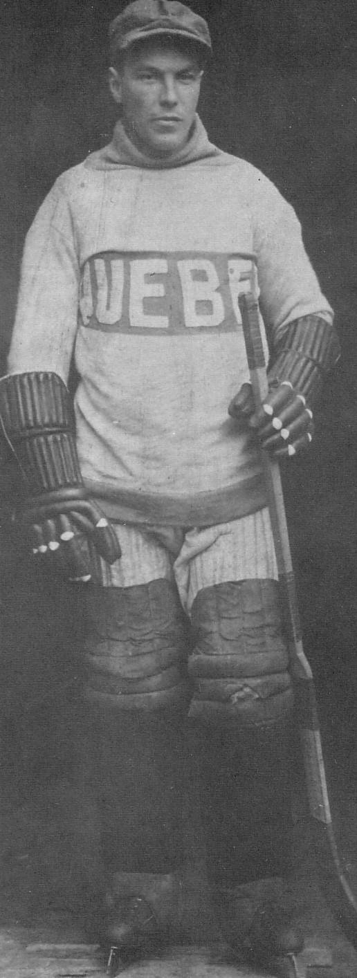 Paddy Moran